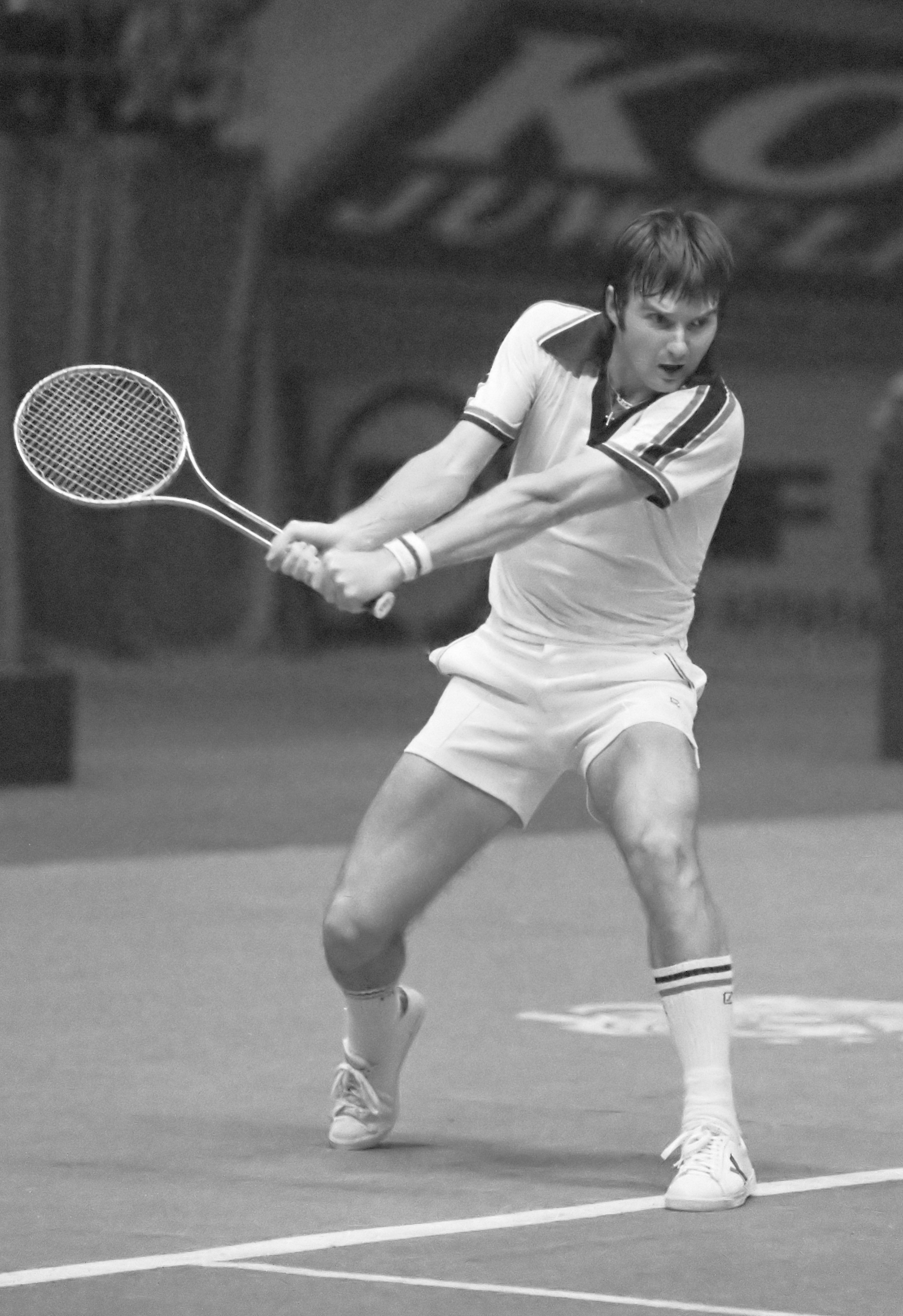 ABN-tennistoernooi in Rotterdam; Jimmy Corners in actie 5 april 1978